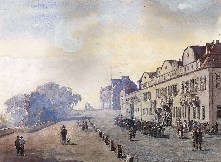 Kassel. Generalkommando Schloß Bellevue und die alte Gemäldegalerie, Gouache. 26 x 35,5